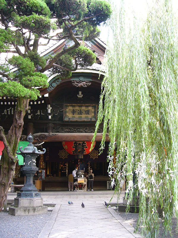 頂法寺または六角堂（京都府京都市）